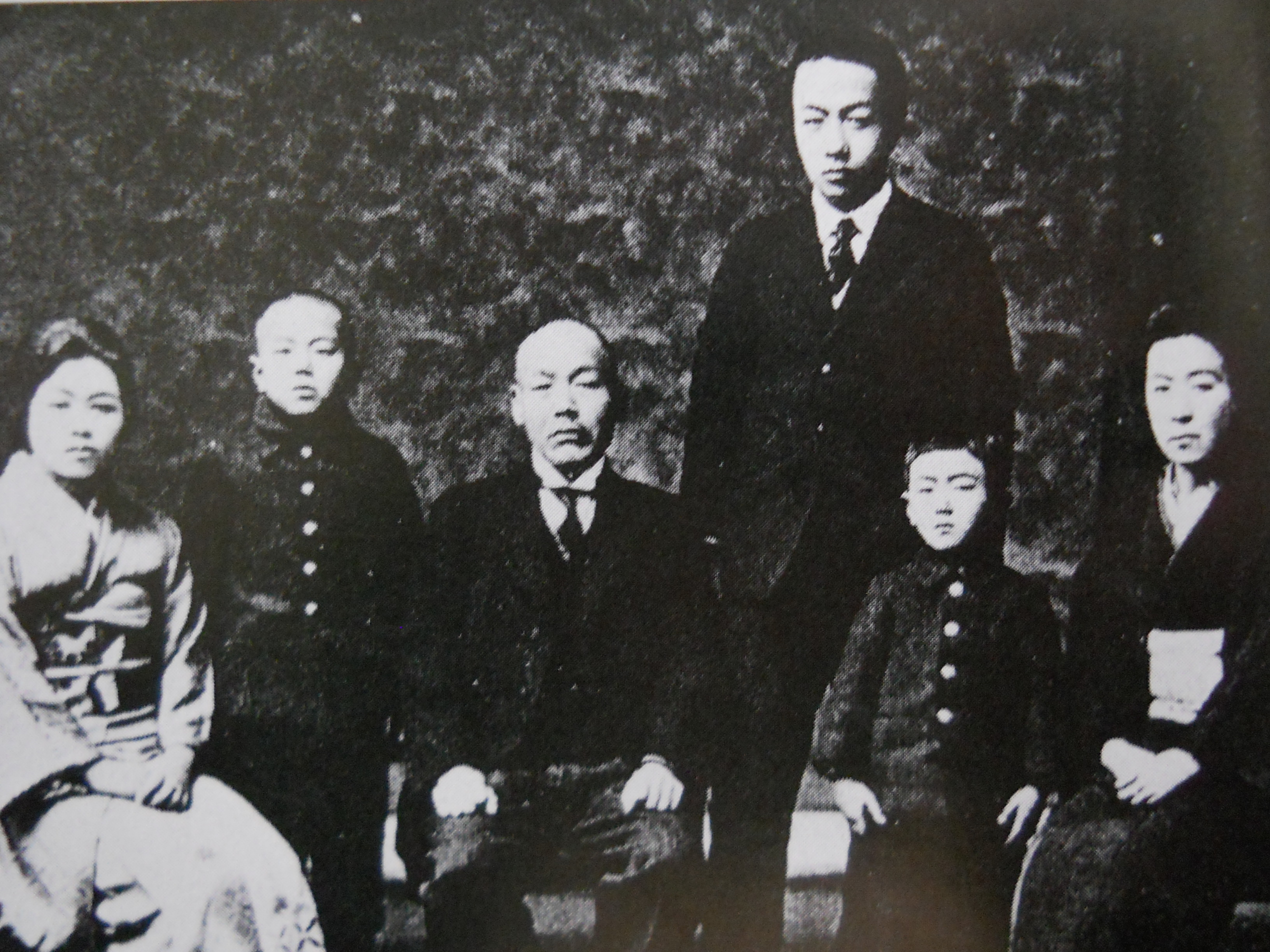 Oooka Family